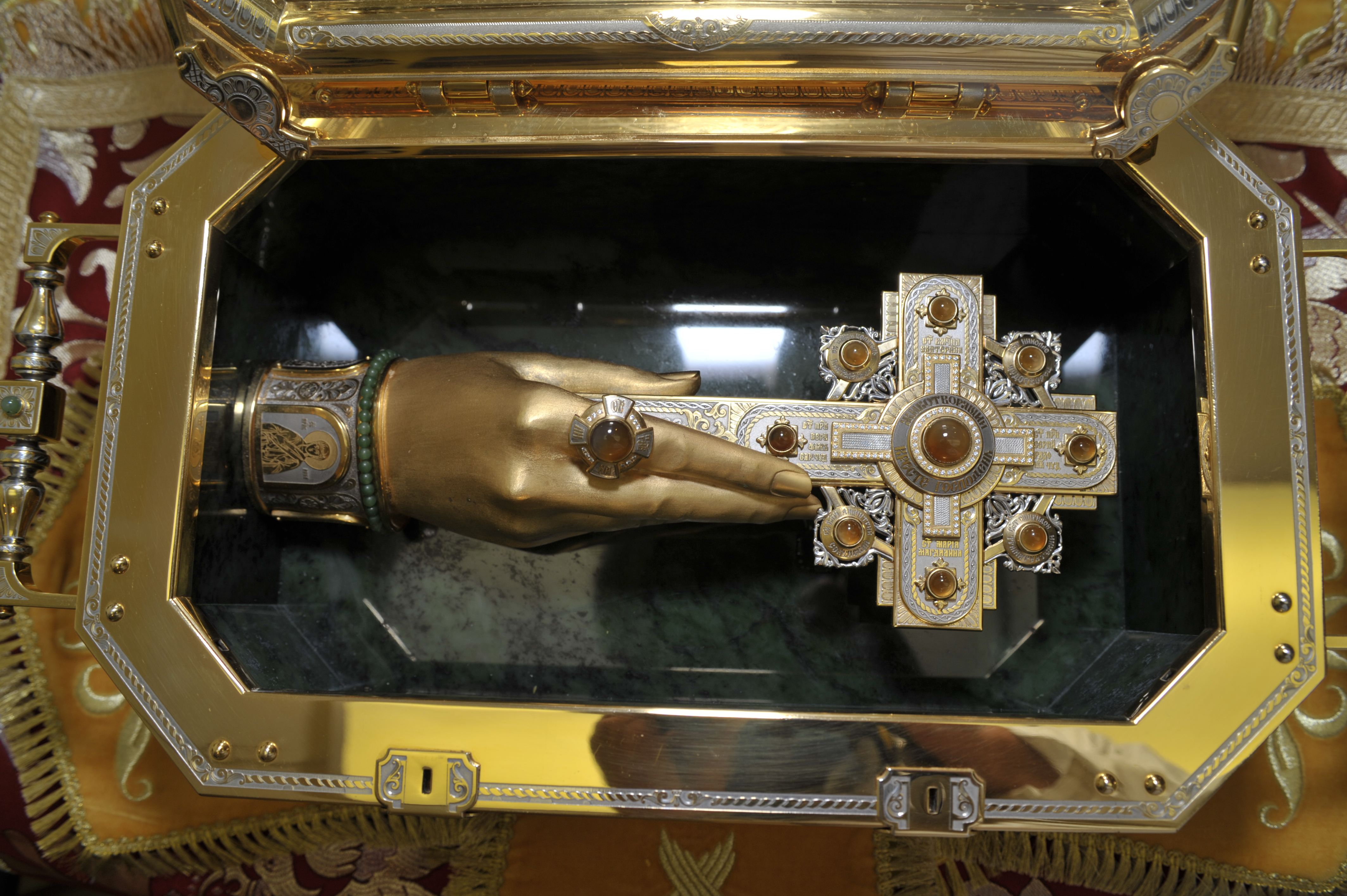 Под капюшонами из драгоценных камней находятся частицы святых мощей